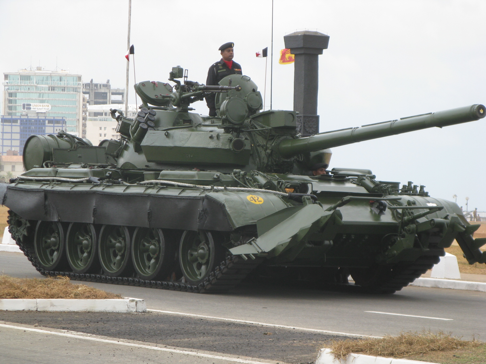 T-55AM2 Main Battle Tank - Sri Lanka Army